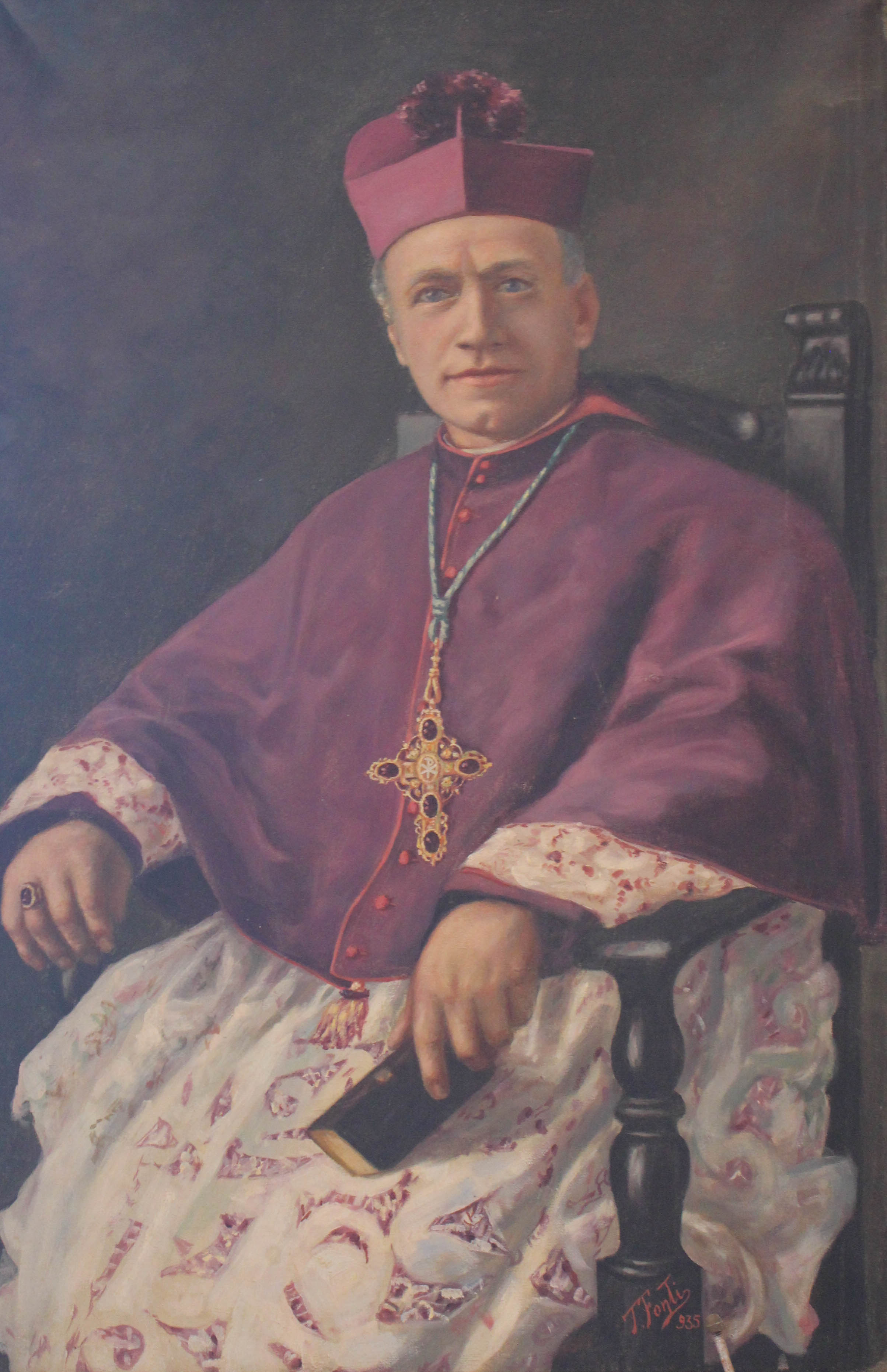 ritratto di giovanni bargiggia vescovo di caltagirone